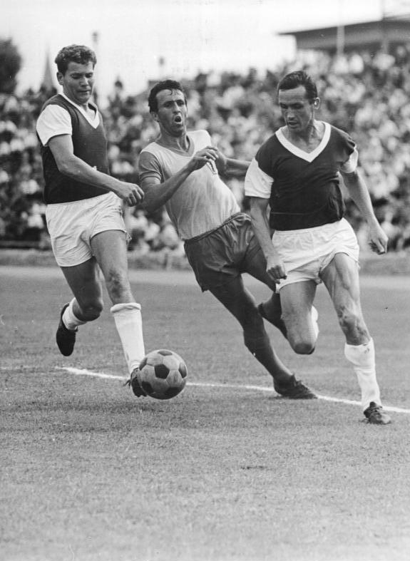 Zentralbild-Koard Ho 20.8.1966 4. Punktspieltag der Oberliga (20.8.1966): FC Vorwärts Berlin - Wismut Aue 2:2 - Der Halblinke des FC Vorwärts Berlin Piepenburg (Bildmitte), Schütze des zweiten Tores in dieser Begegnung, im gegnerischen Strafraum. Links Schürer II und rechts Zink von Wismut Aue.